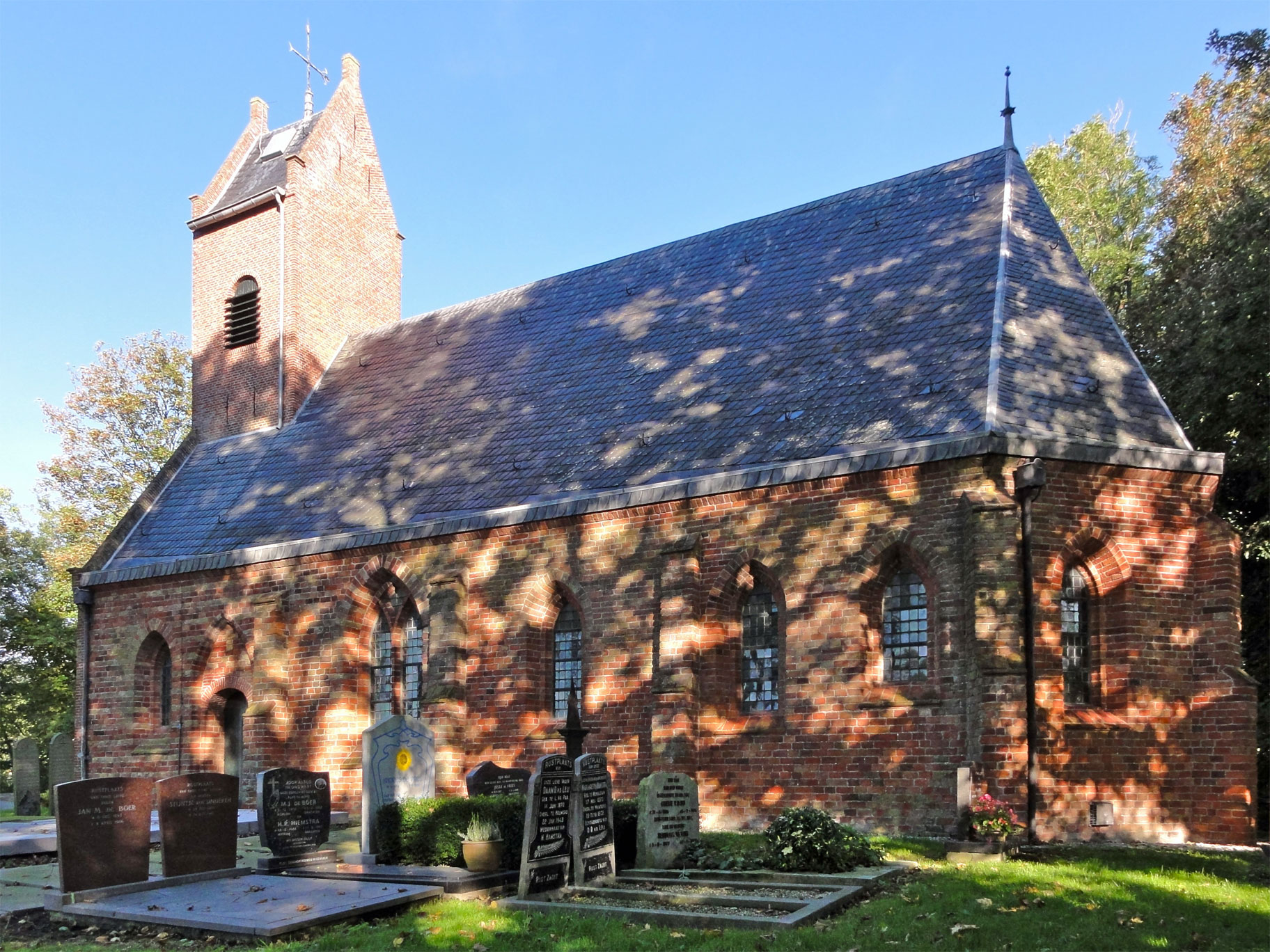 Sint-Thomaskerk van Waaxens, rijksmonument